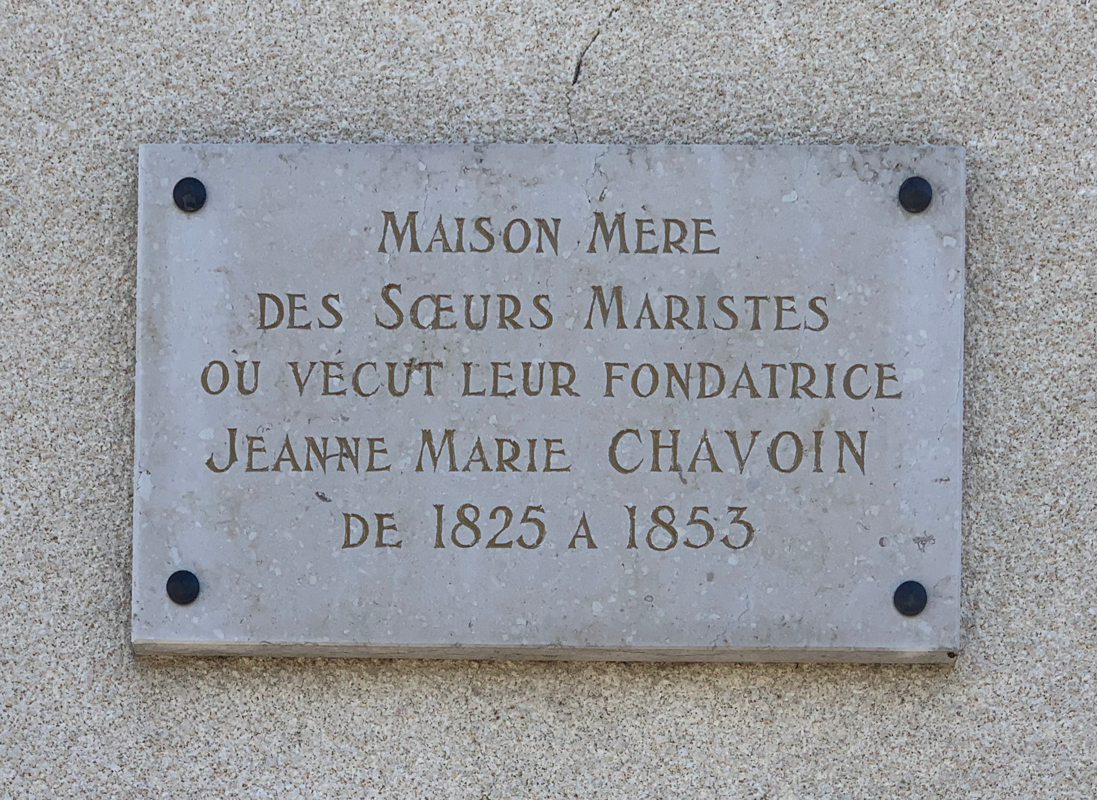 Plaque à Jeanne Marie Chavoin sur la maison de Bon-Repos à Belley.